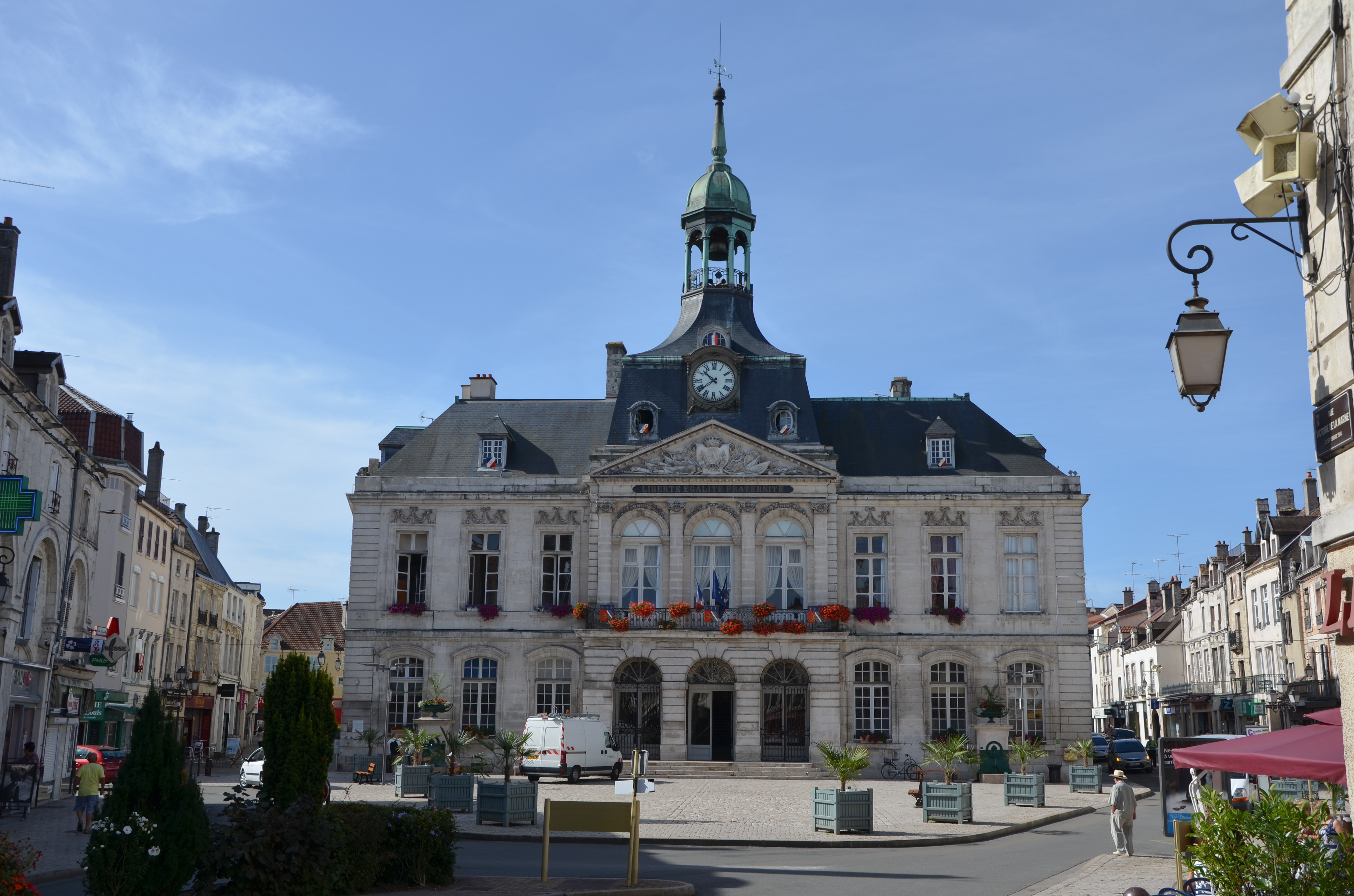 L'Hotel de ville de Chaumont, Haute-Marne, Champagne-Ardennes, France